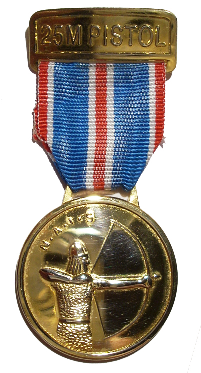 NAIS-gullmedalje for pistol